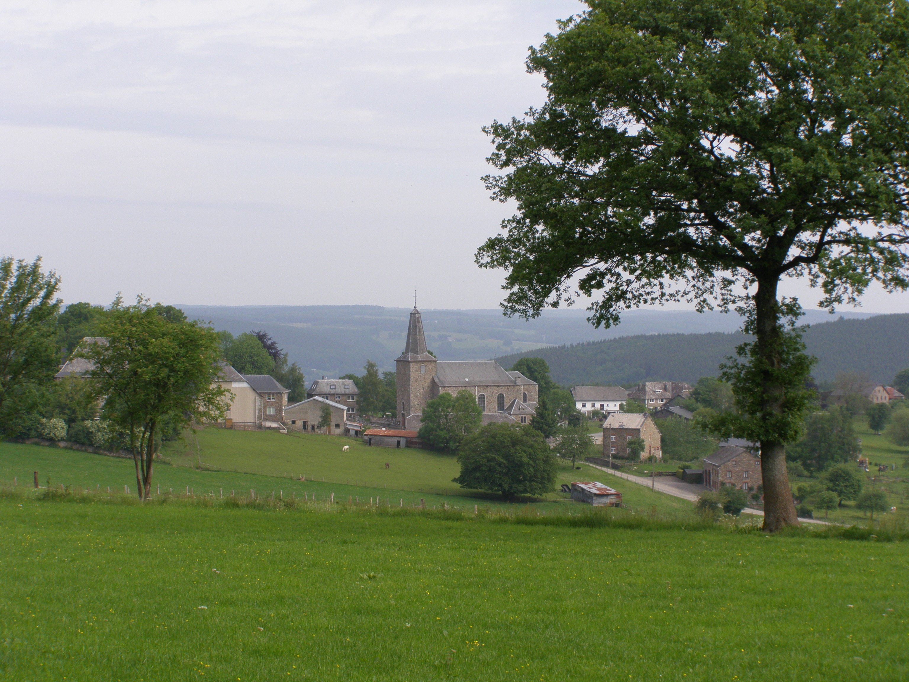 eigen werk